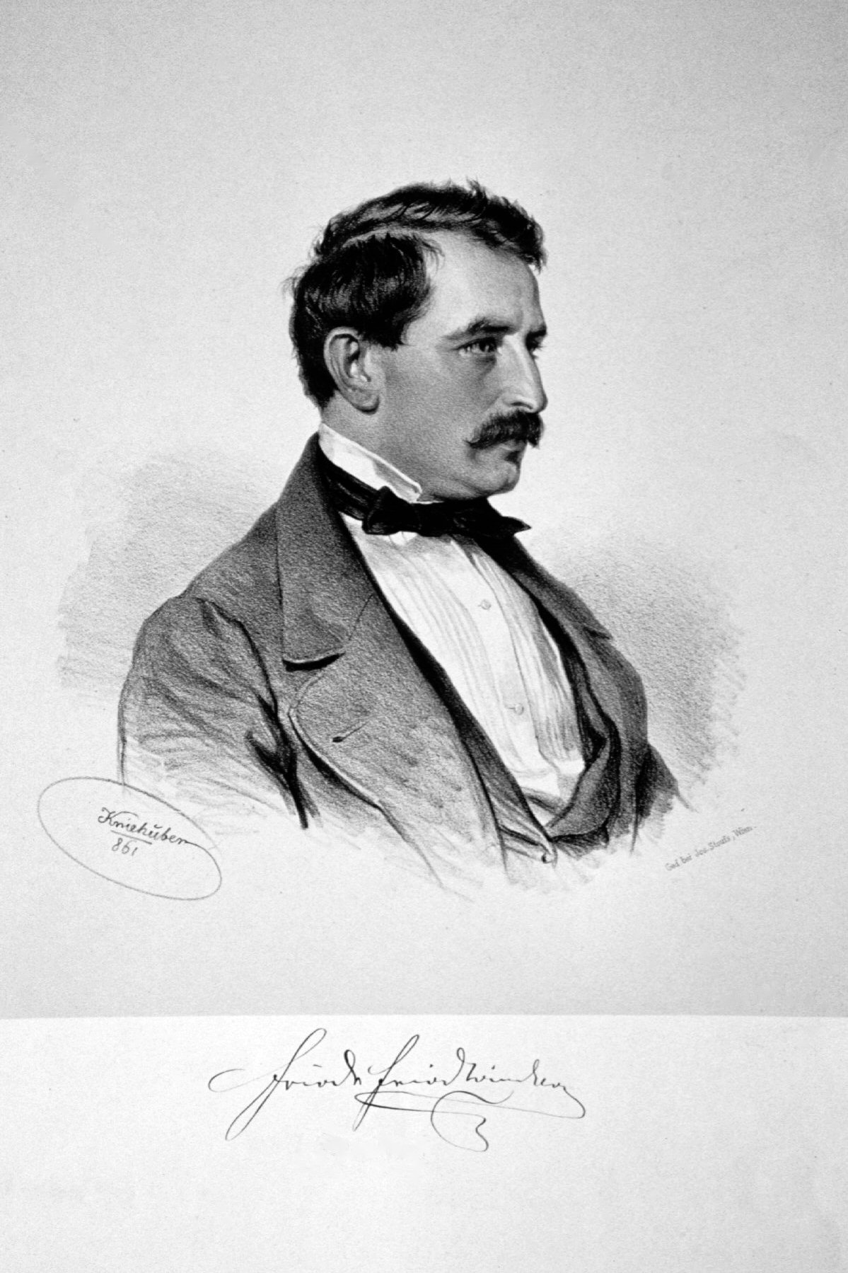 Friedrich von Friedländer-Mahlheim (1825-1901), österreichischer Historienmaler